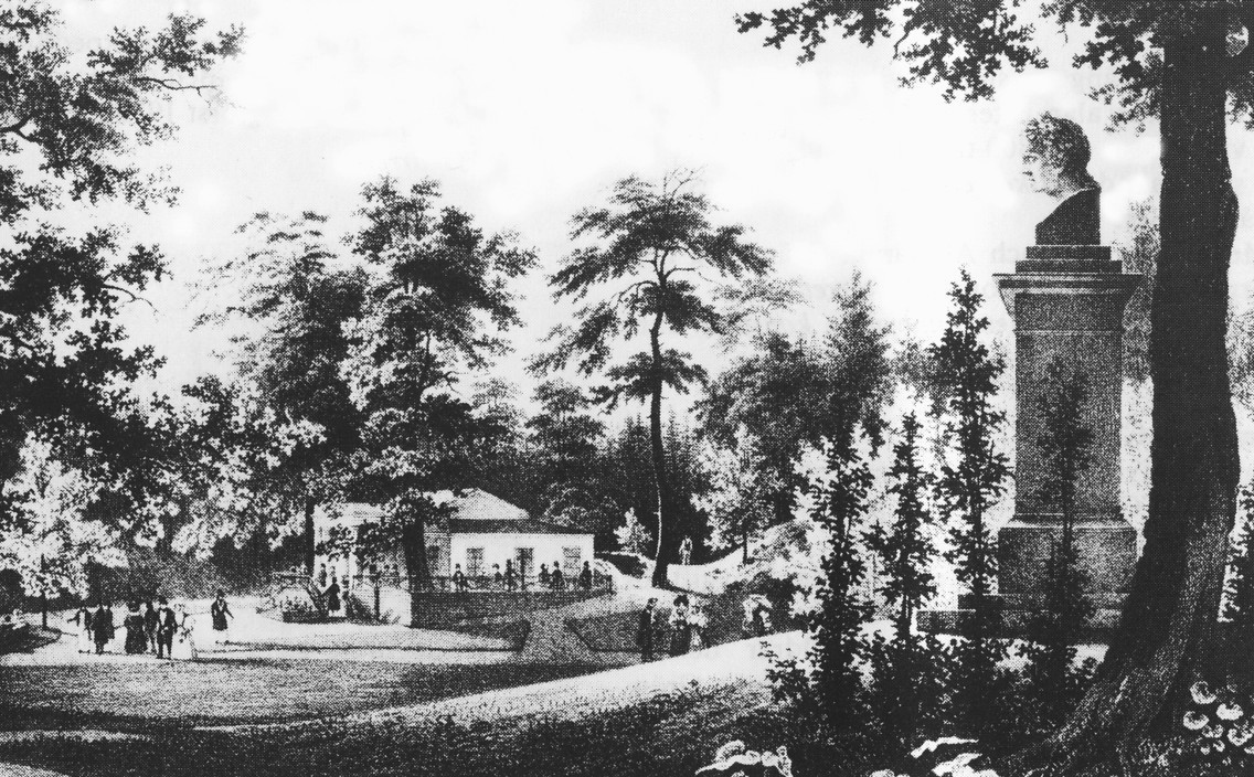 Bellmansro och C.M. Bellmans byst på Djurgården i Stockholm